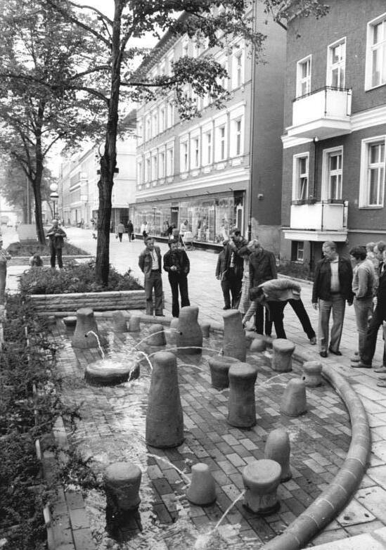 ADN-ZB-Pätzold-19.8.81 Berlin: Ein neuer Spielbrunnen für Kinder ist an der Straße der Befreiung seiner Bestimmung übergeben worden. Aus seinen Becken ragen über 20 abstrakte kegelstumpfartige Gebilde empor, aus denen Wasserspeier das flache, mit Fliesen ausgelegte Bassin füllen.